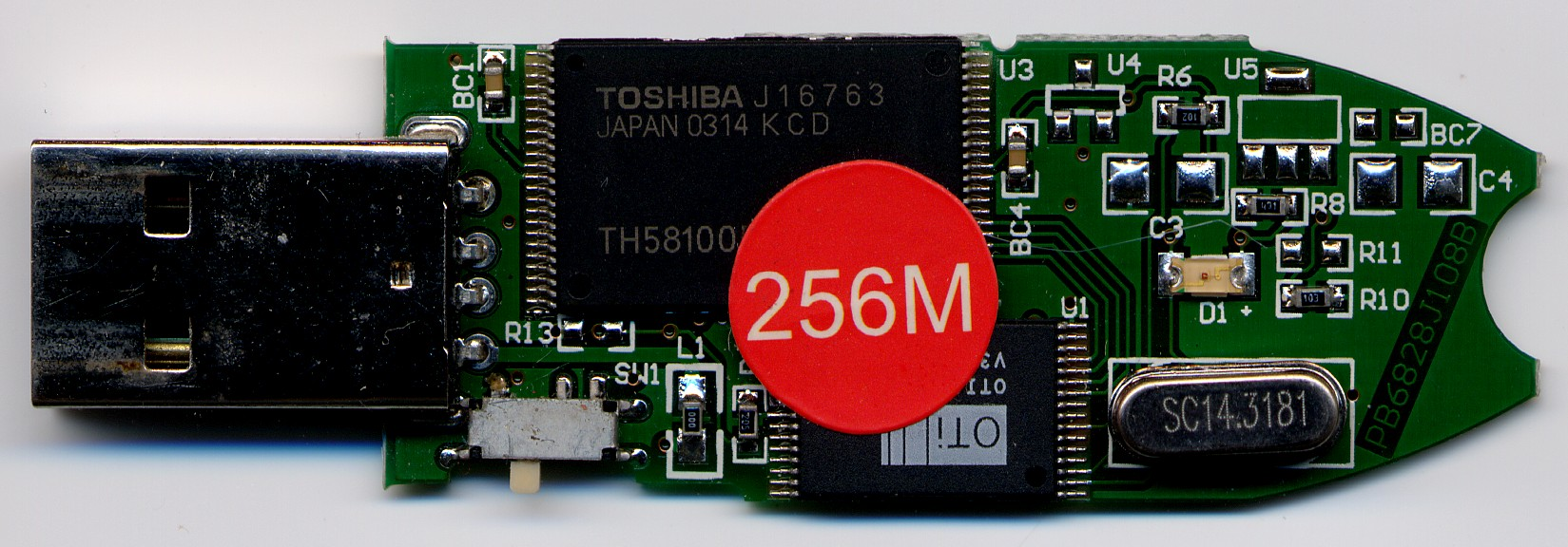 USB-Stick, geöffnet